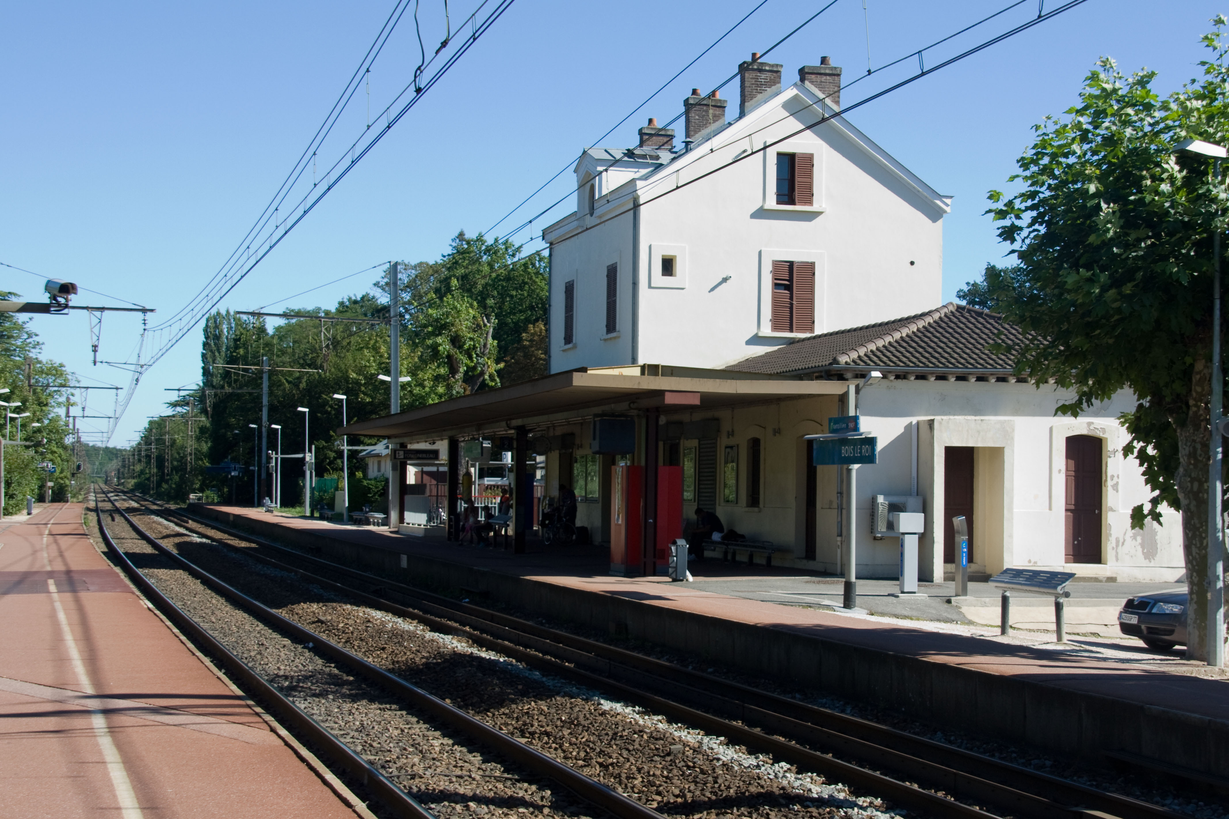 Gare de Bois-le-Roi, Bois-le-Roi, Seine-et-Marne, France